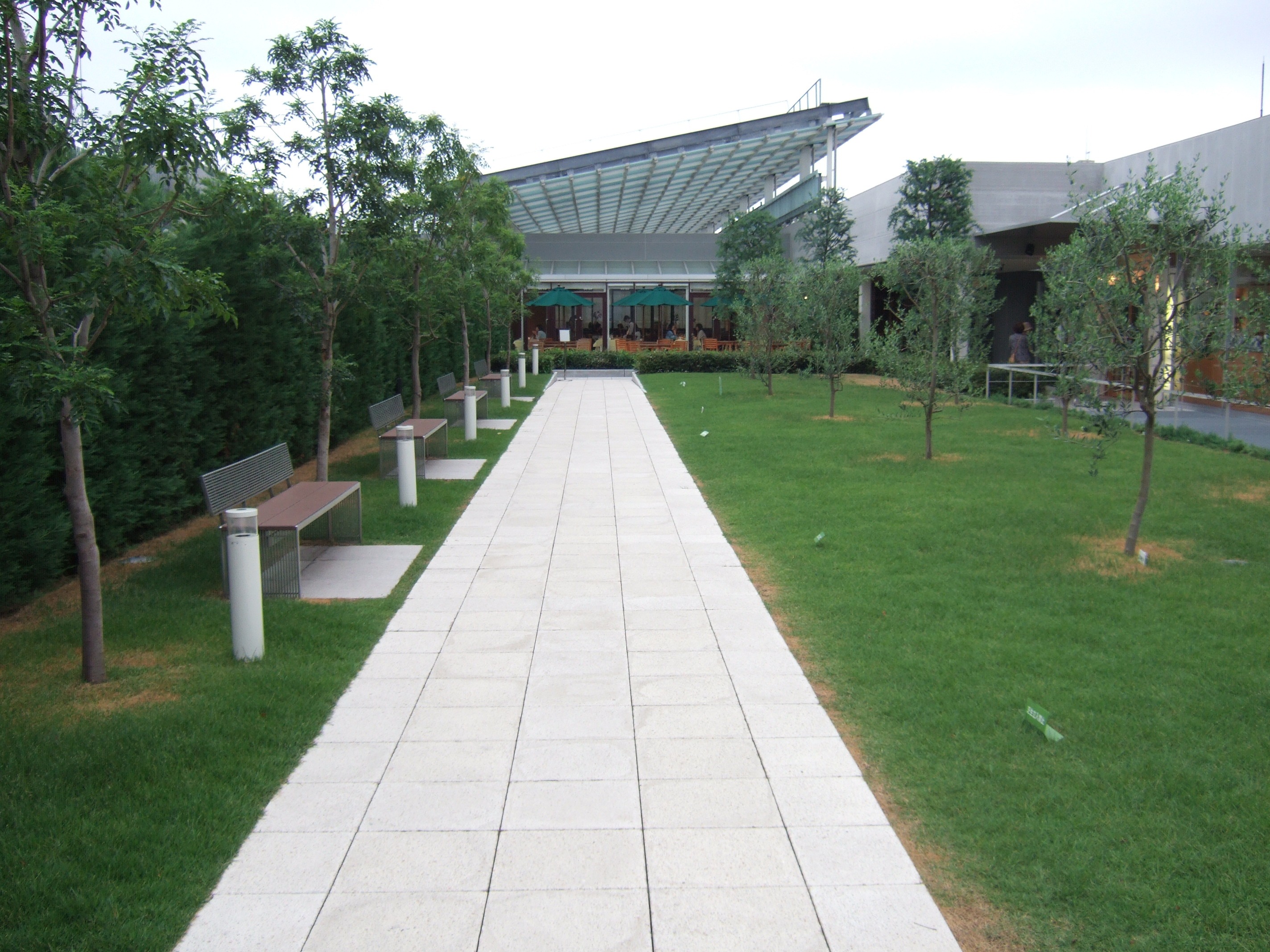 成城コルティ西側庭園